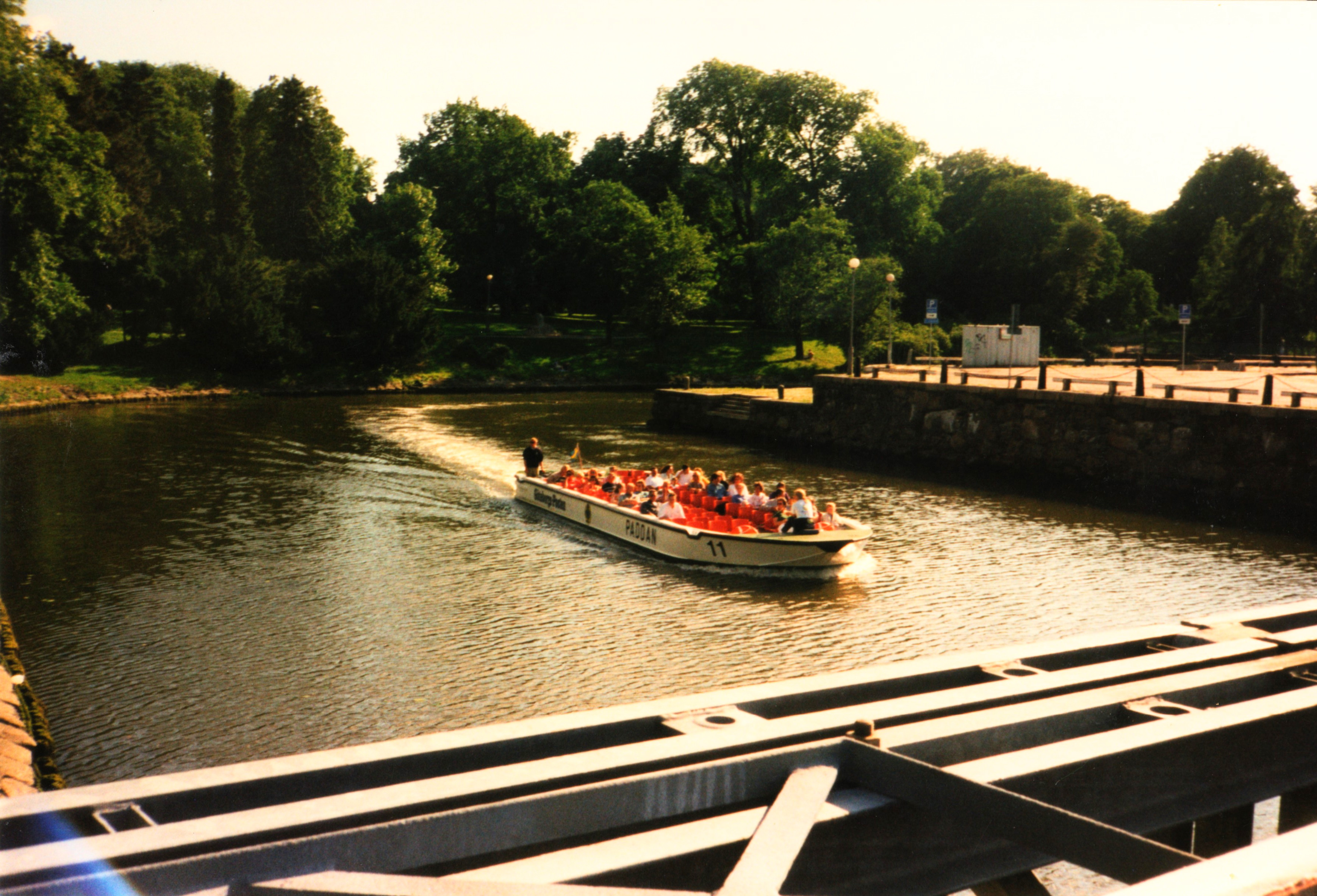 Paddan, Vallgraven (1970-talet)